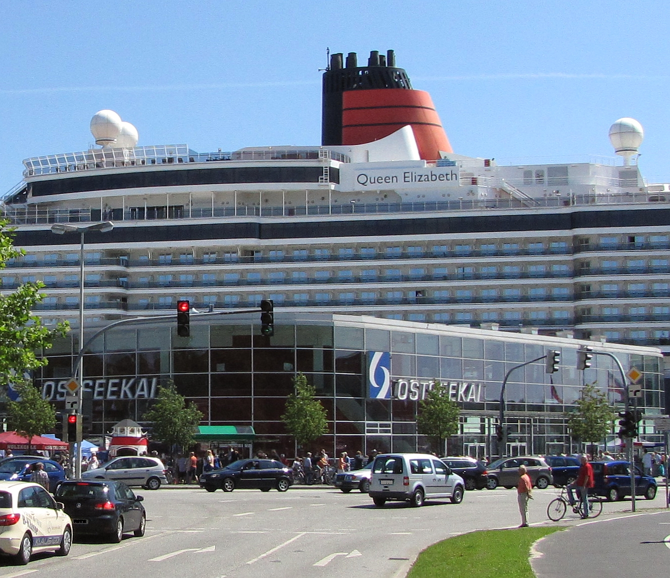 Ansicht Ostseekai in Kiel mit Kreuzfahrtschiff Queen Elizabeth Foto 24.07.2012 Wolfgang Pehlemann Steinberg-Ostsee